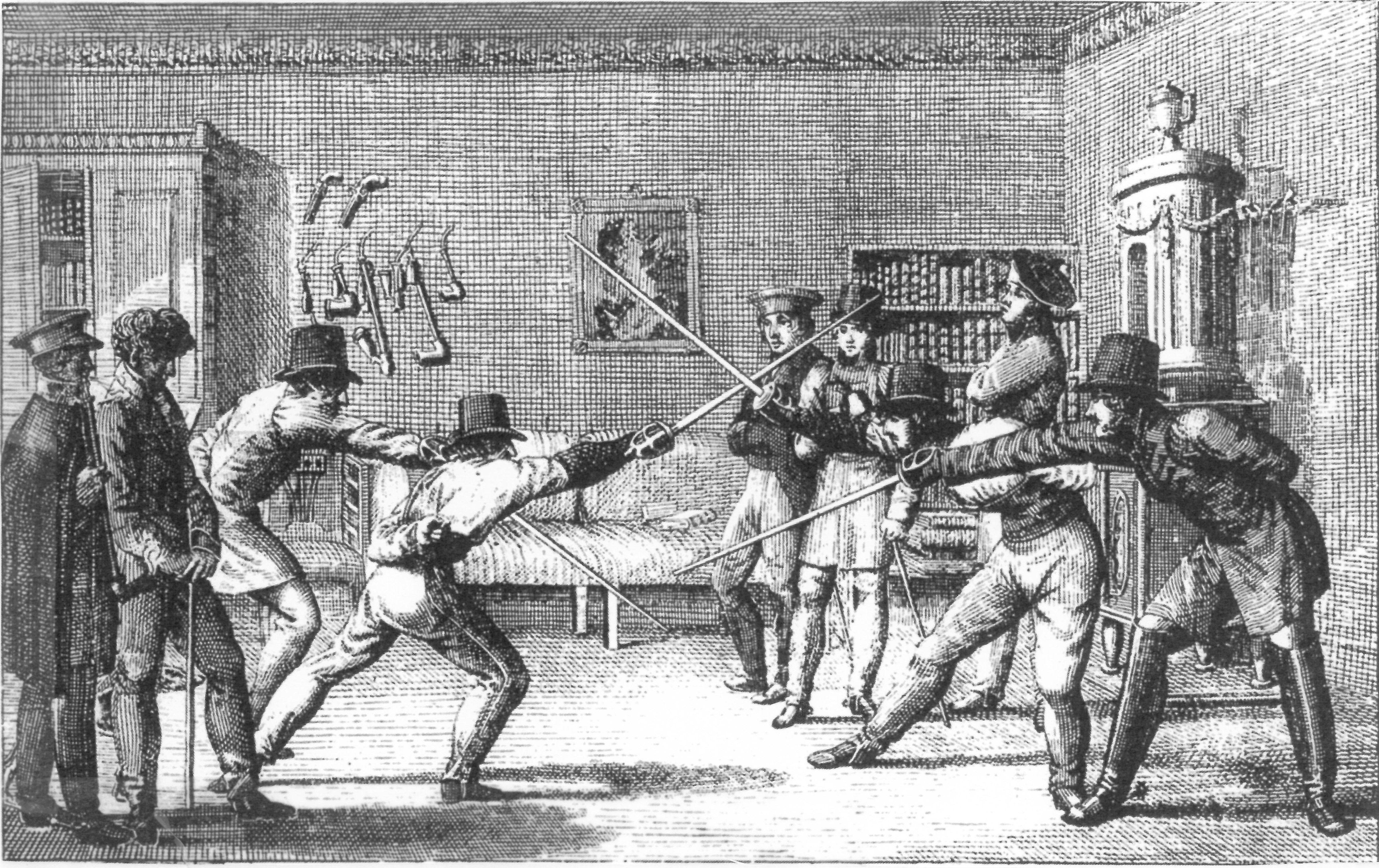 Stammbuchblatt mit Darstellung des Duells des Göttinger stud. math. Jacob Beyfuß c/a stud. Bauer am 13. März 1816 in Bovenden. Die Paukanten sind Wilde, die keiner Verbindung angehören. Die sonstigen Beteiligten des Duells gehören auf Seiten von Beyfuß dem Corps Guestpahlia Göttingen an; die auf Seiten Bauers dem Corps Hannovera. Alle abgebildeten Personen sind aufgrund von Stammbucheinträgen und der Universitätsgerichtsakten namentlich bekannt (von links nach rechts): stud. jur. Franz Ludwig Martin Borsdorf, Hoffmann, Friedrich von Ostman/ oder Gerding (?) (Sekundant), Beyfuß (Paukant links), NN, Unparteischer, NN, Bauer (Paukant rechts) und August Görtz (Sekundant ganz rechts); also vier Personen namentlich benannt aber im Stich nicht genau bezeichnet, darunter Apel und Carl Philipp Gütschow. Von diesem Stammbuchblatt bestehen zwei Versionen: die Grundversion von Besemann mit senkrecht gestreiften Tapeten und die nach seinem Tode 1818 von Riepenhausen überarbeitete Version mit den nunmehr karierten Tapeten, die vorstehend abgebildet ist. Dazu weiterführend: Hans-Werner Wolf: Ein Göttinger Studentenduell im Jahre 1816. Monographie eines Stammbuchblattes. In: Göttinger Jahrbuch 1974, S. 137-150; Otto Deneke / Fritz Scheidemann: Göttinger Stammbuchkupfer, 1938, S. 40, Nr. 32